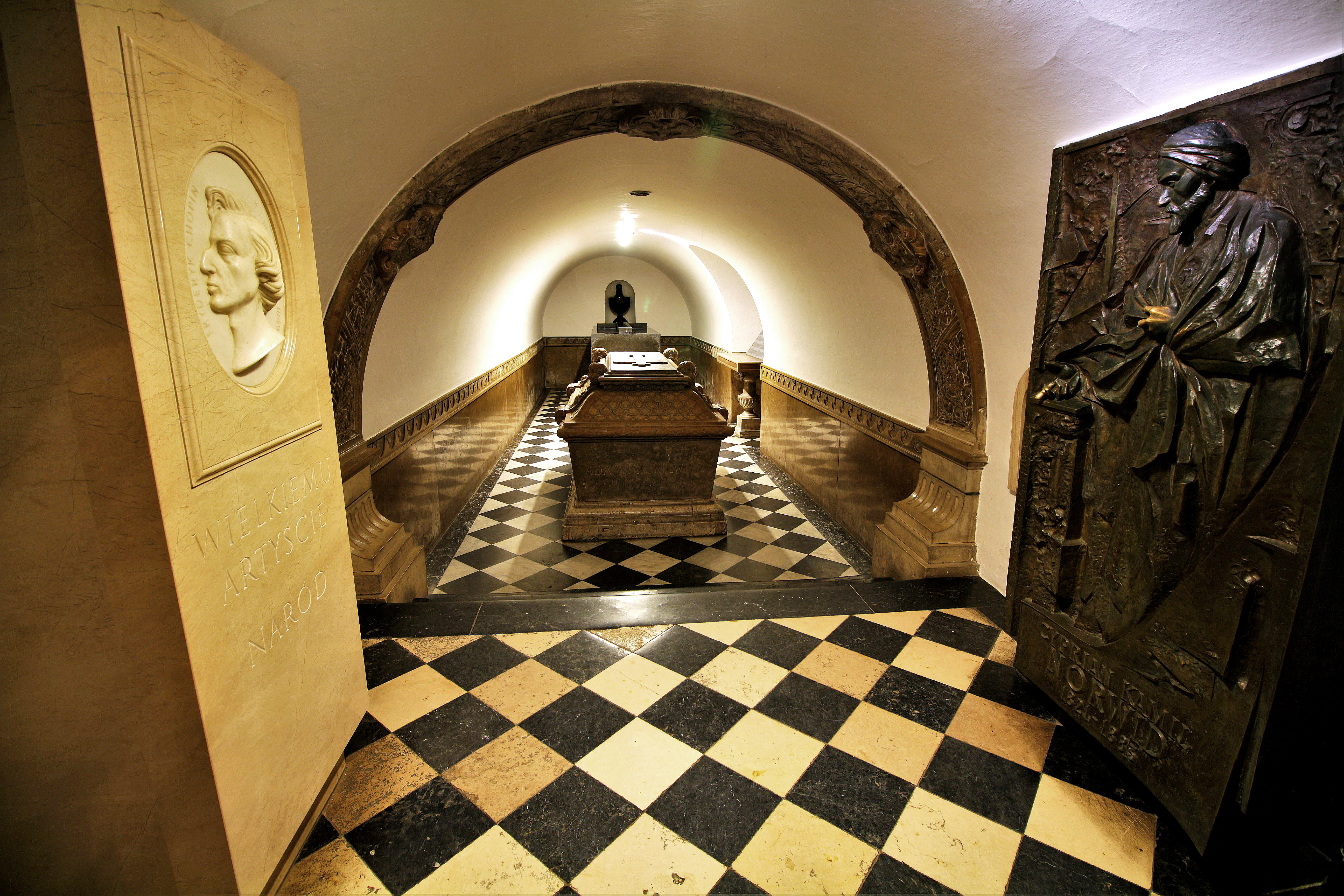 Kraków, Krypta Wieszczów Narodowych na Wawelu